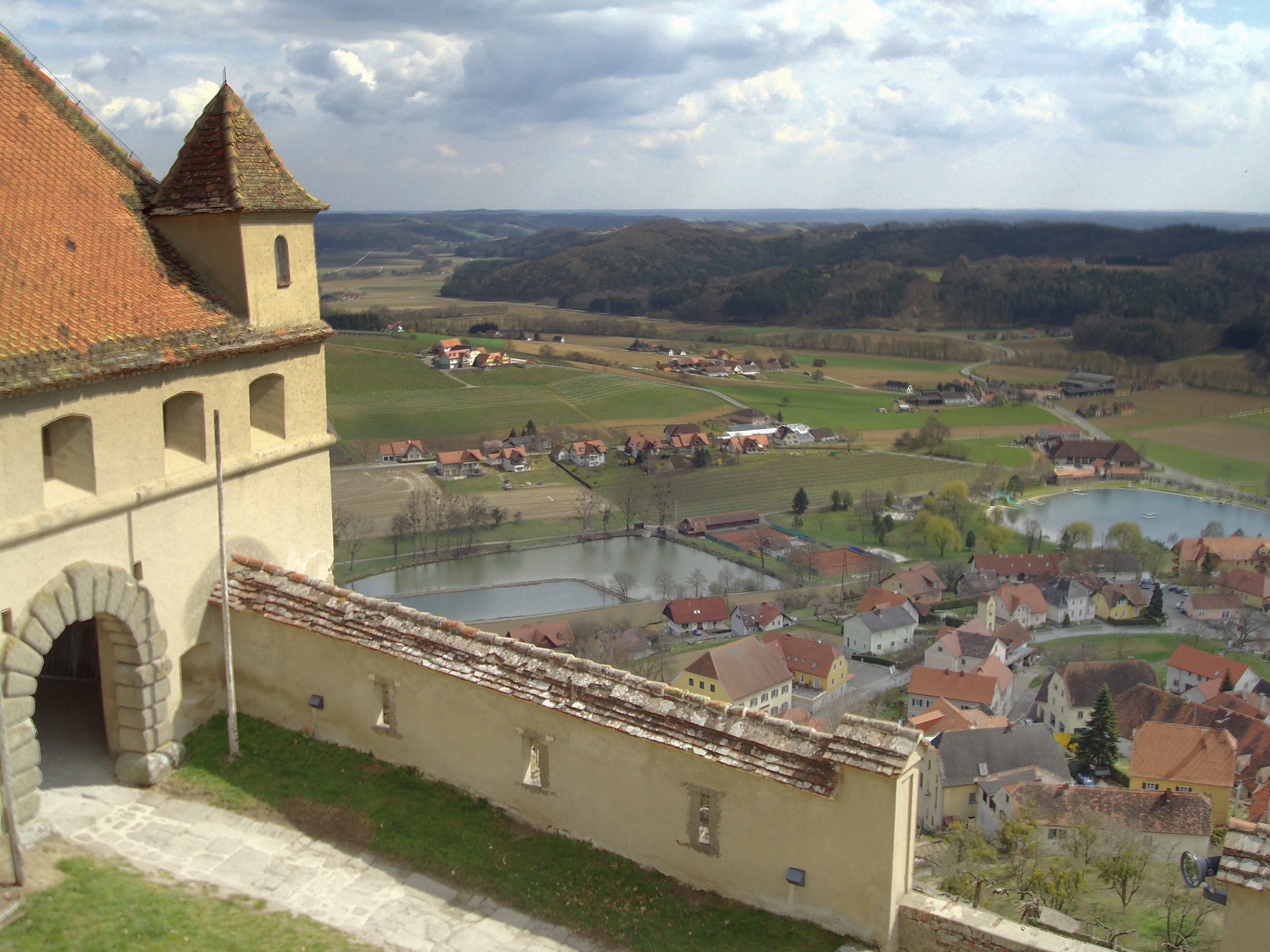 Riegersburg, Steiermark, Austria